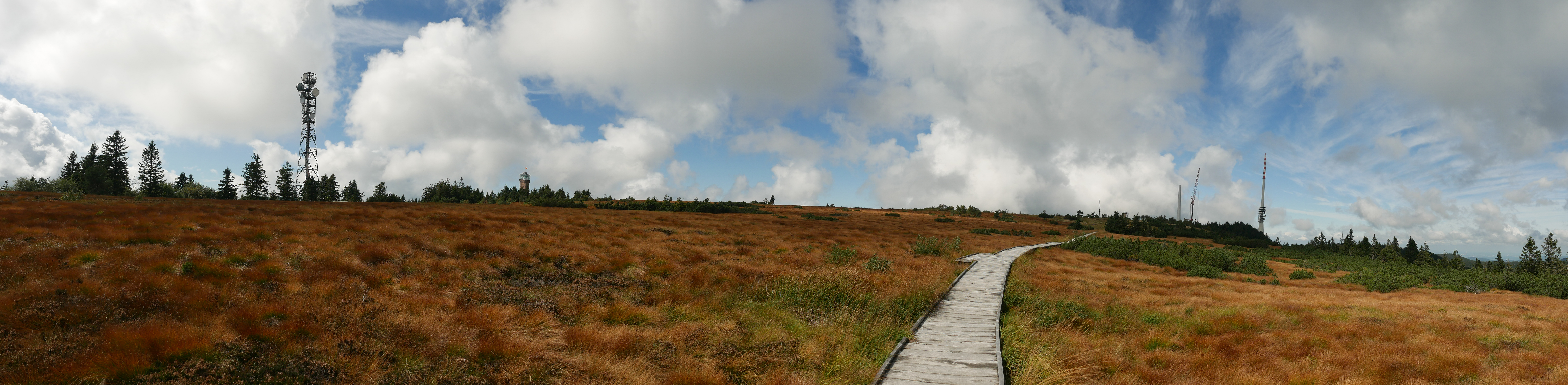 Hochmoor am Gipfel der Hornisgrinde im Schwarzwald, mit Baustelle Windkraftanlage